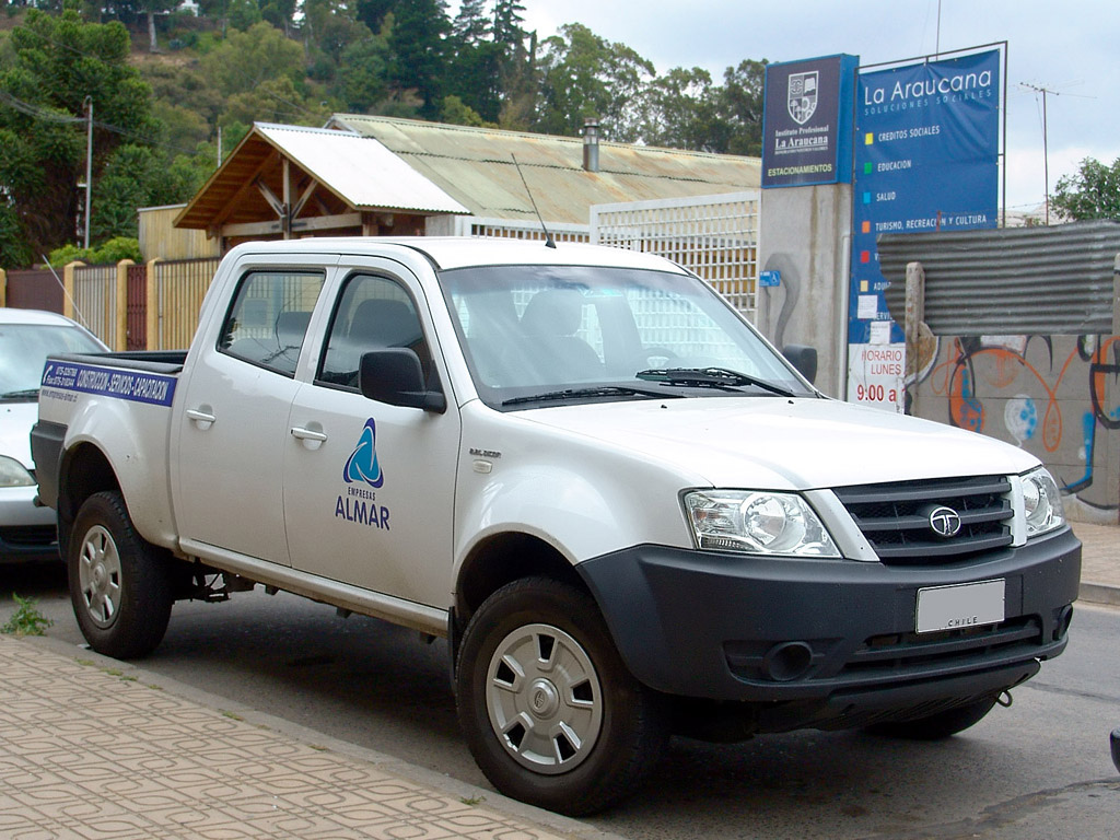 Tata Xenon DLE 2.2L Dicor 2010